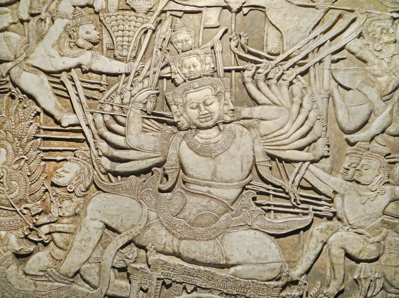 Détail du moulage d'une section du bas-relief de la "bataille de Lanka" Angkor Vat, aile ouest de la galerie de la troisième enceinte (galerie des bas-reliefs), coté nord Scène du Ramayana montrant Ravana, le roi des démons sur son char Mission Louis Delaporte 1881-1882 Tirage en plâtre d'après un estampage à la terre de Joseph Ghilardi Plâtre patiné, montage filasse sur armature de bois Moulage présenté dans l'exposition "Angkor : la naissance d'un mythe" (musée Guimet) Voir le classeur de dalbera sur le Cambodge (notamment les monuments d'Angkor)